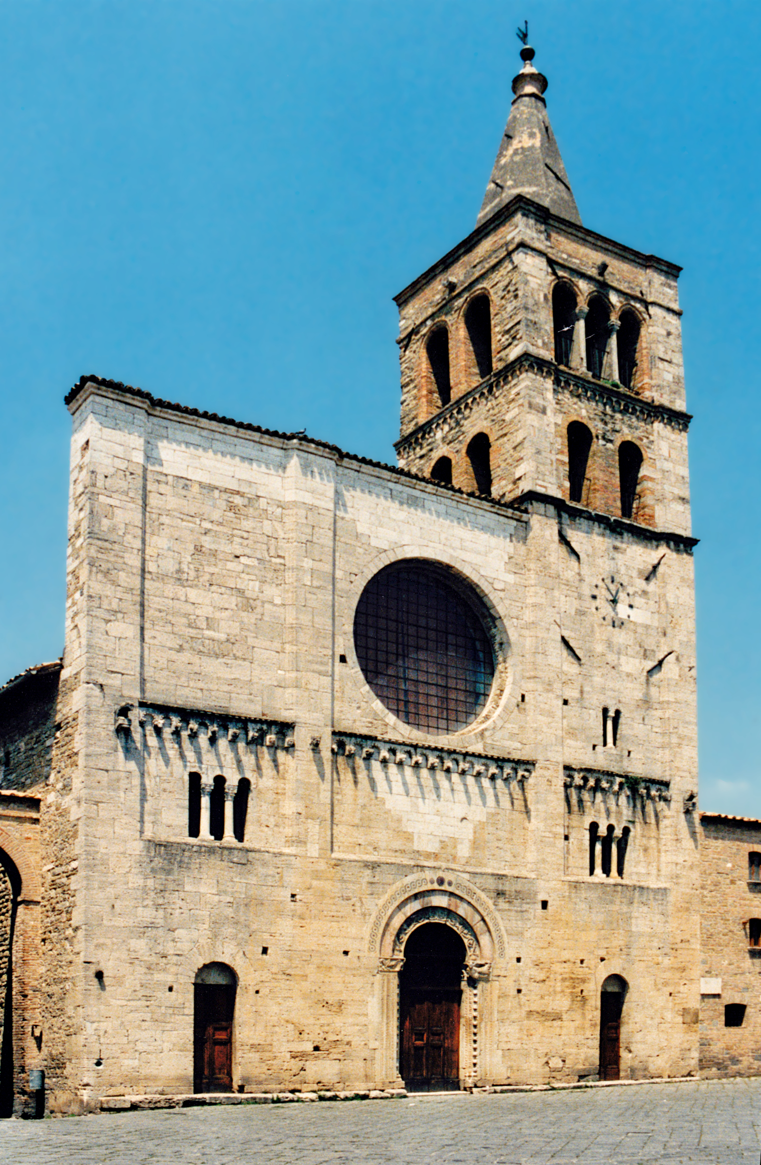 Italie - Ombrie - Cathédrale de Bevagna